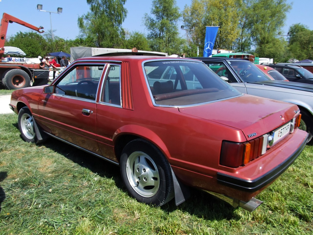 Quelle: selbst fotografiert, 04/2007 Fotograf: Späth Chr.